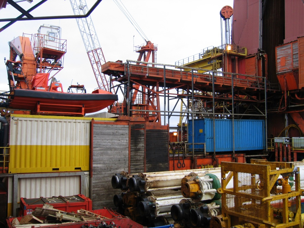 Situasjonsbilde fra rørhåndteringsdekk på boreriggen Transocean Searcher, 2005.